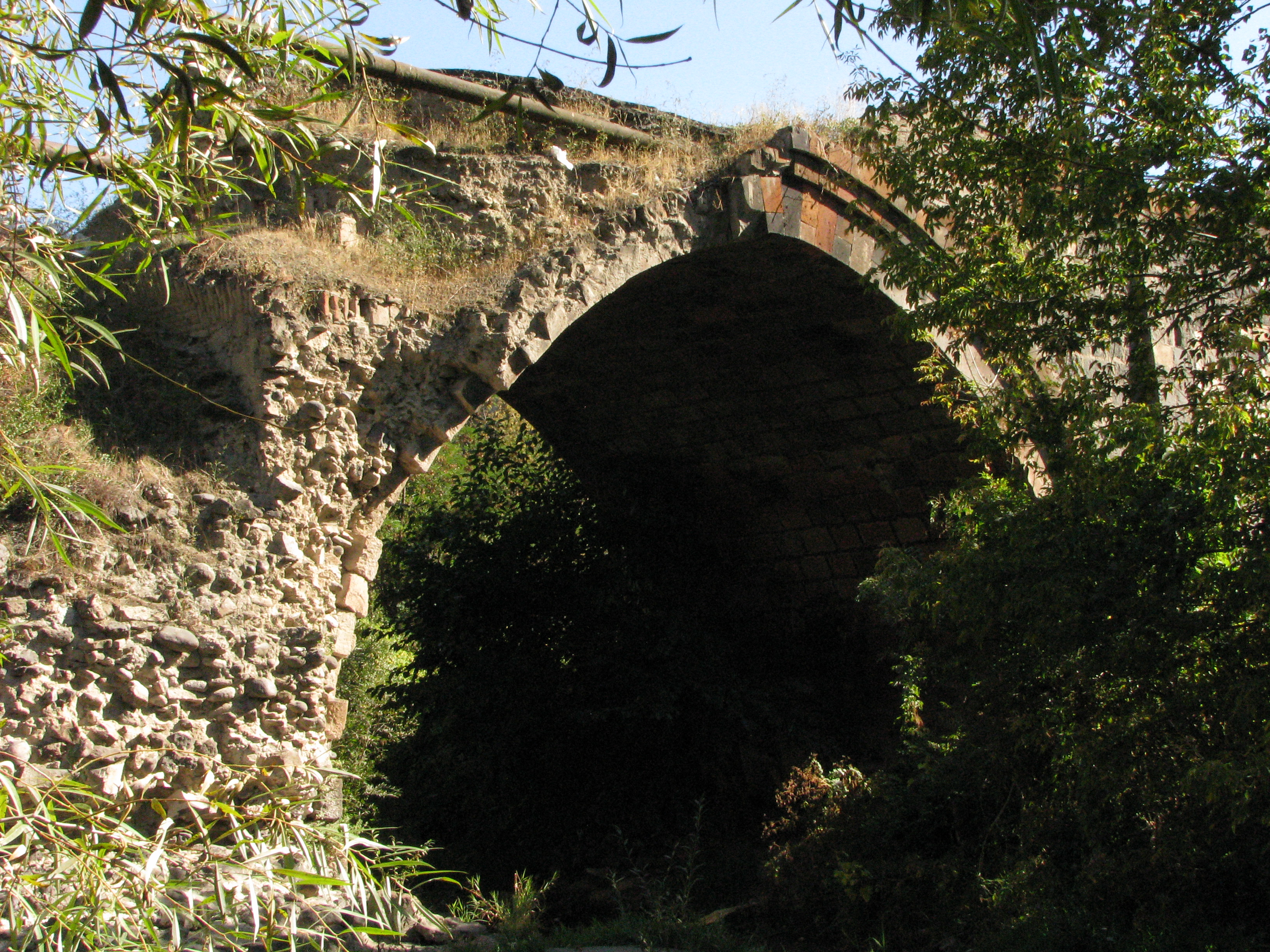 Red Bridge, Yerevan 6/84